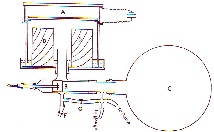 ウィルソンがα線とβ線などの放射線の飛跡の撮影に初めて成功した霧箱。1912年。 C.T.R.Wilson (1912). “On an Expansion Appeatus for making Visible the Tracks of Ionising Particles in Gases and Resuults obtained by its Use”. Roy.soc,Pric.,A 87: 355-371.